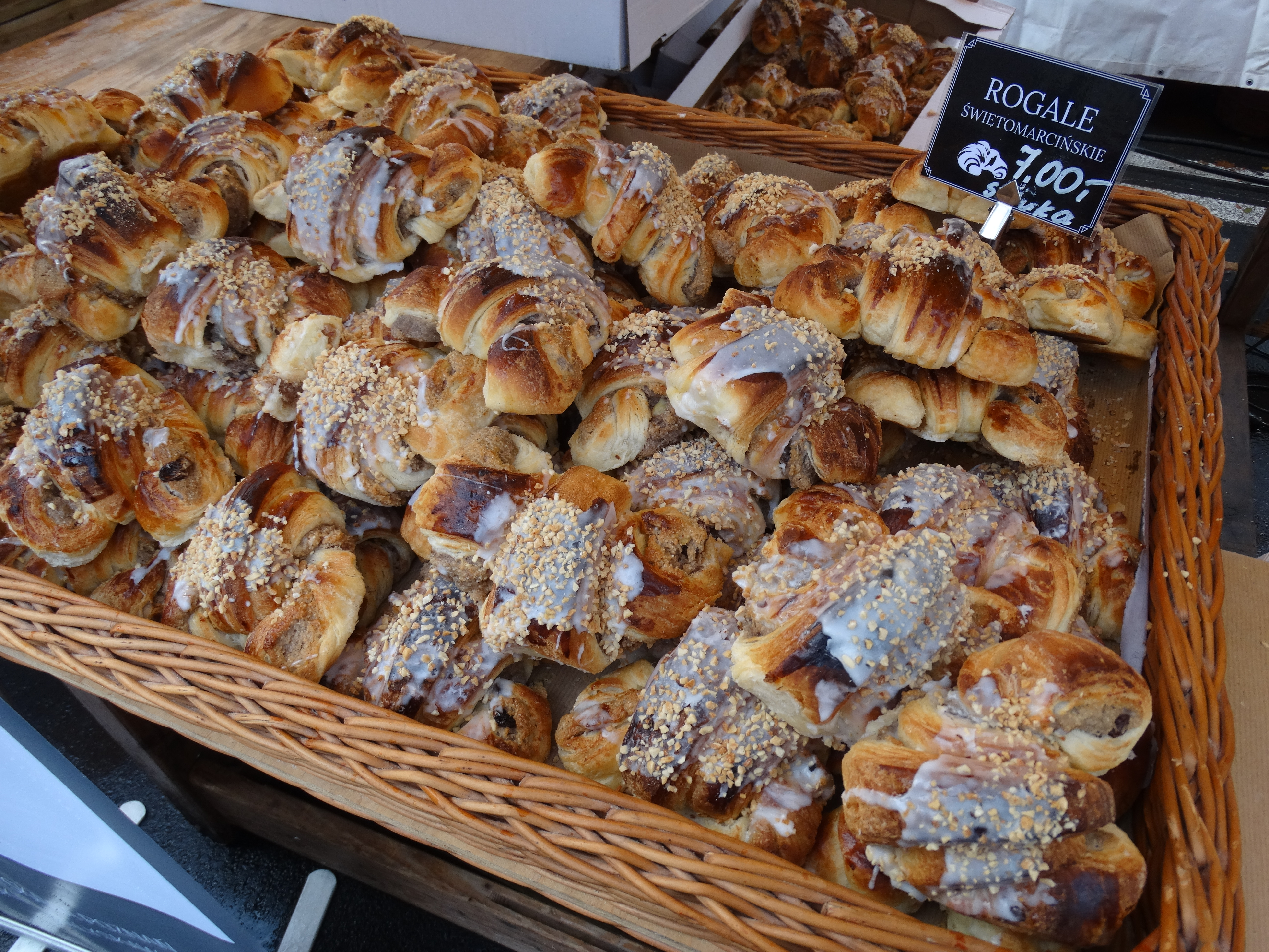 Rogale świętomarcińskie cukierni Łyskawa